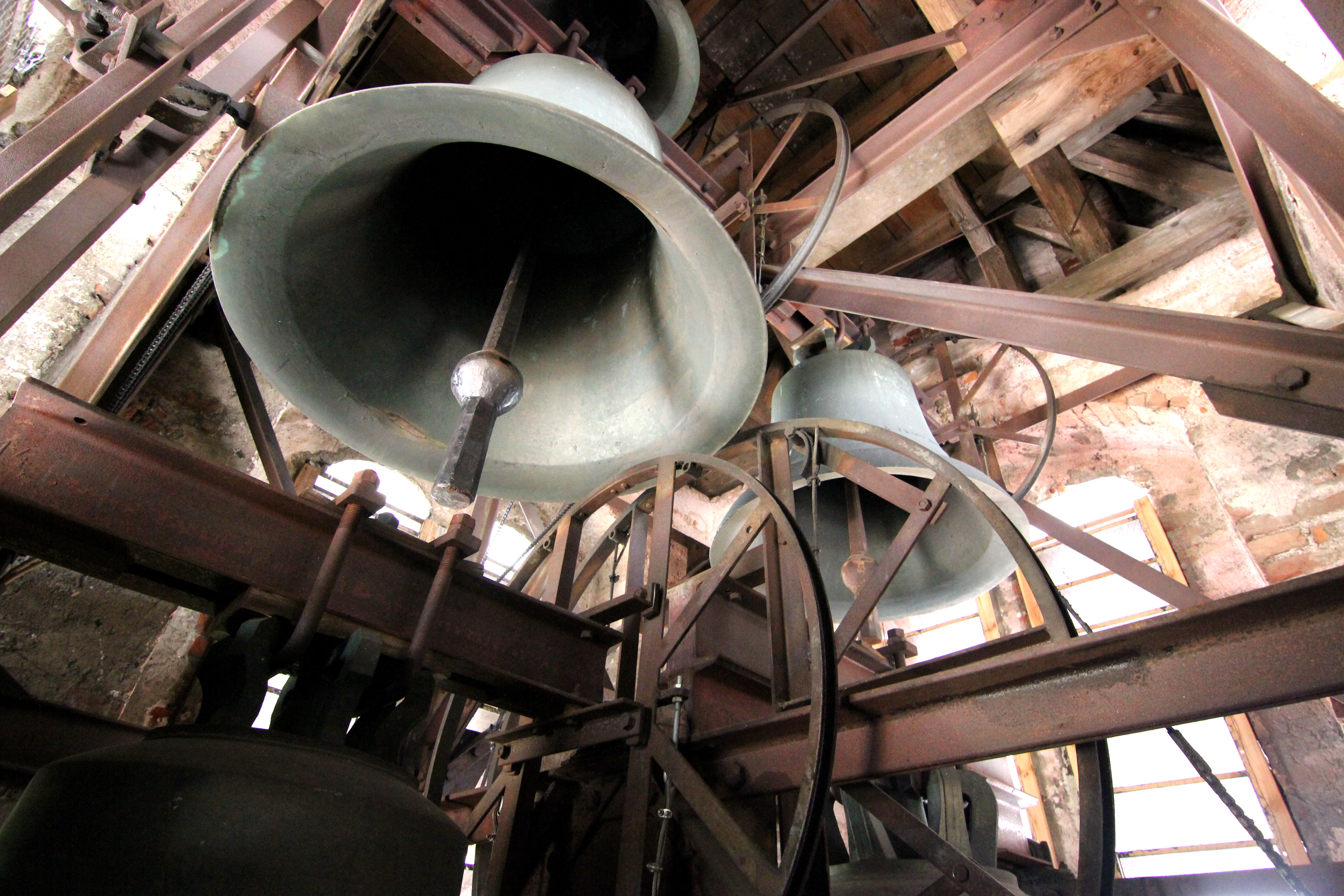 Glocken im Glockenstuhl in der Kirche Unser Lieben Frauen in Lauben im Landkreis Unterallgäu